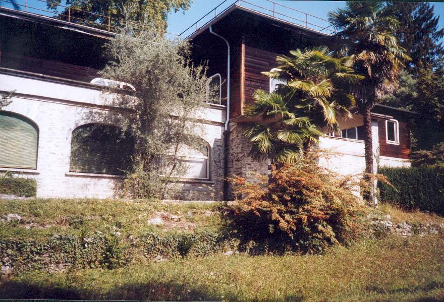 Casa Anatta, Monte Verita, Ascona, Schweiz